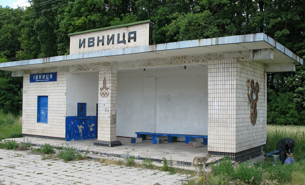 Івниця